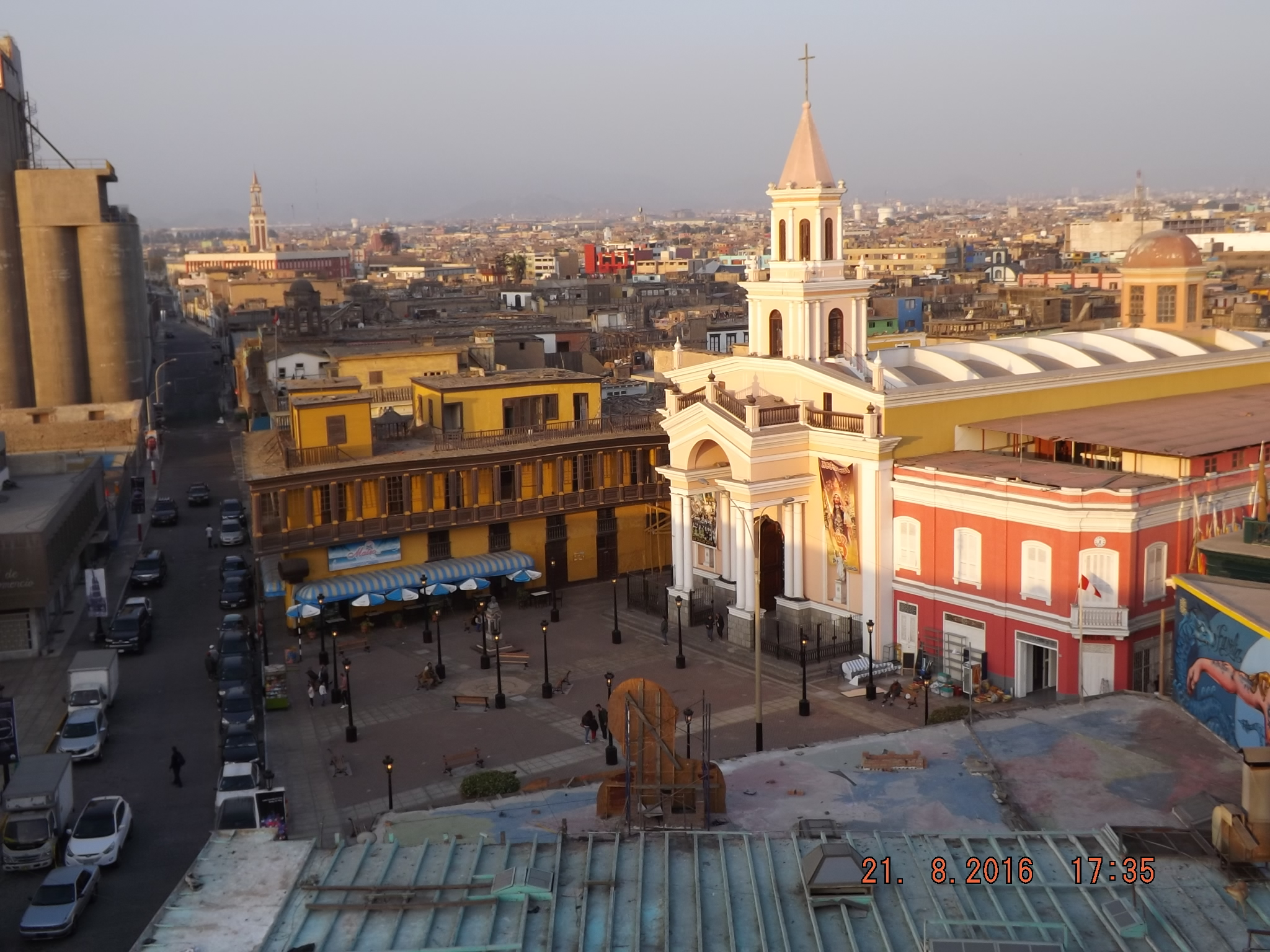 Principal iglesia del puerto del Callao